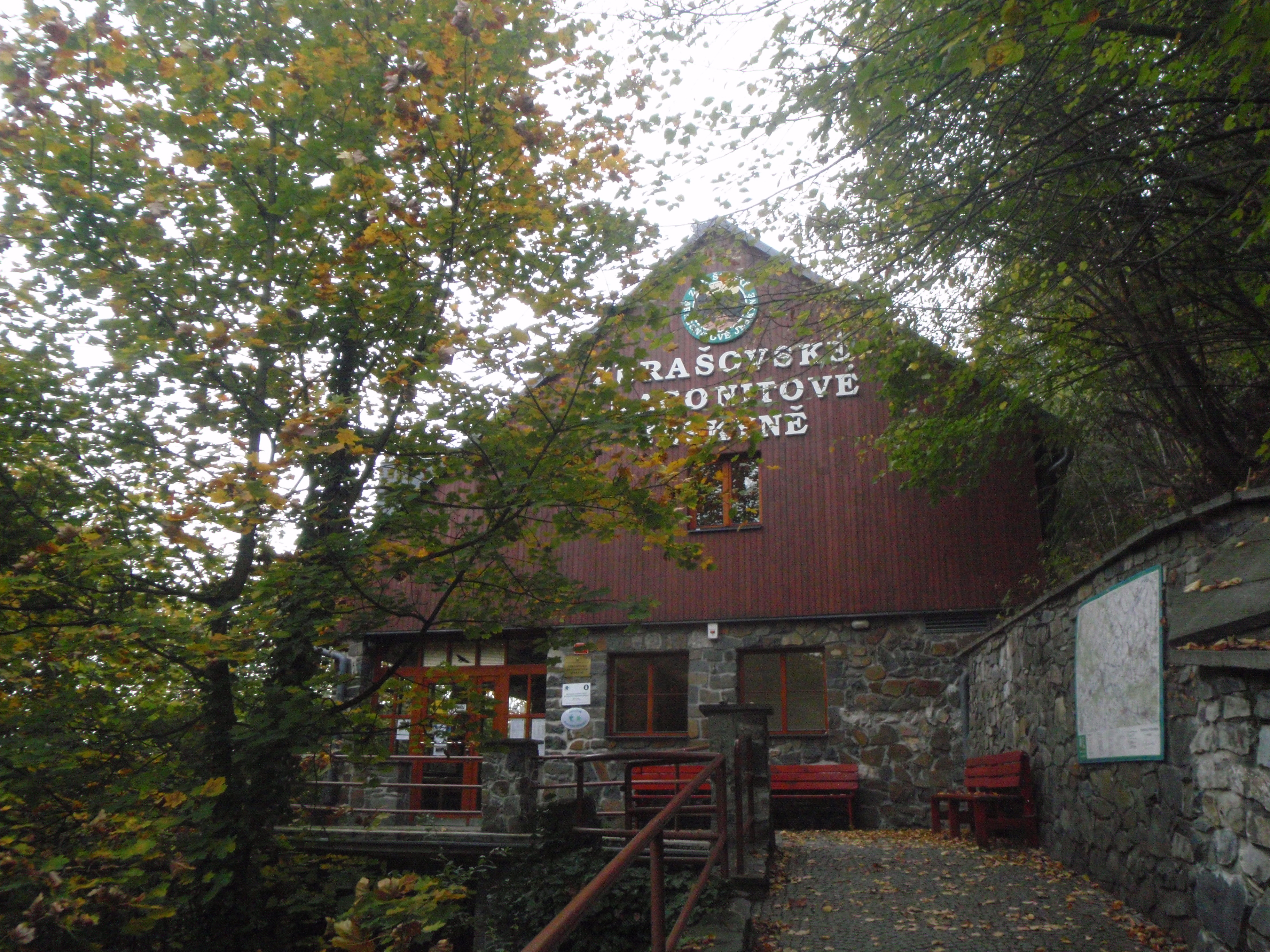 Vstupní budova